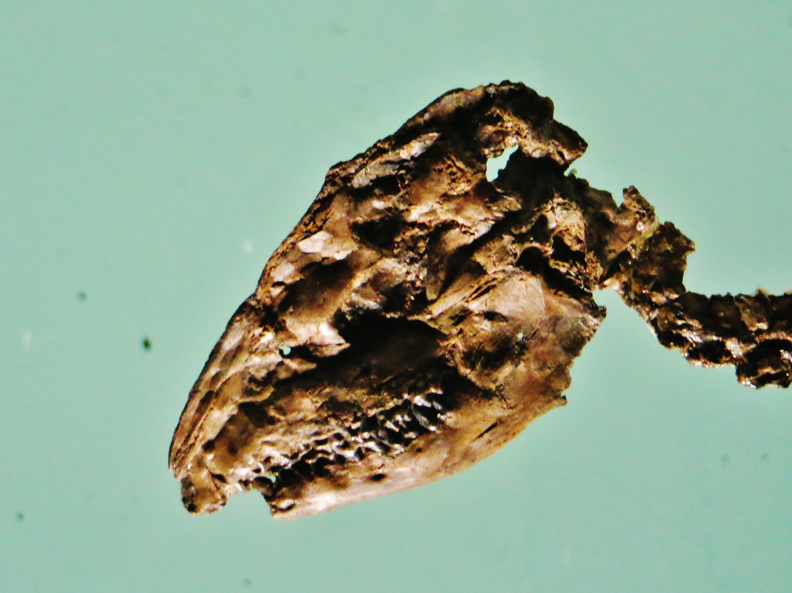 Took the picture at Senckenberg Museum, Frankfurt